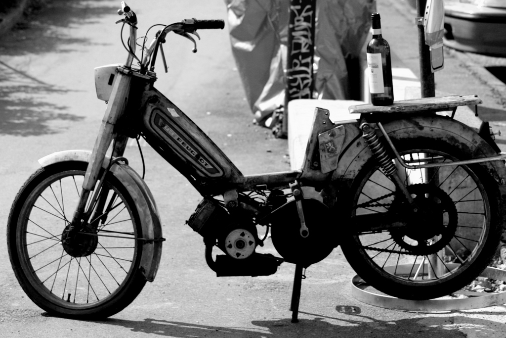 Guida in stato di ebbrezza / Quando si dice la guida sotto effetti dell'alcool...